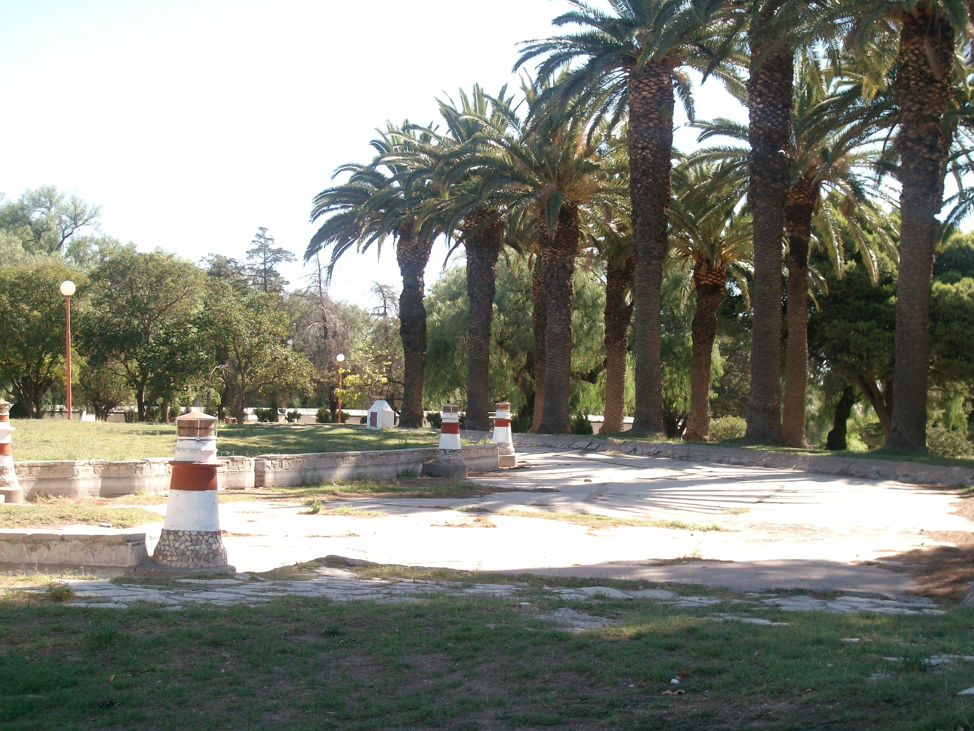 Parque Independencia